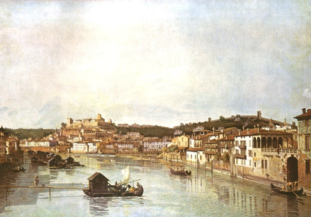 Verona vom Ponte Nuovo aus etschaufwärts gesehen (Ausschnitt)title QS:P1476,de:"Verona vom Ponte Nuovo aus etschaufwärts gesehen (Ausschnitt)" label QS:Lde,"Verona vom Ponte Nuovo aus etschaufwärts gesehen (Ausschnitt)"